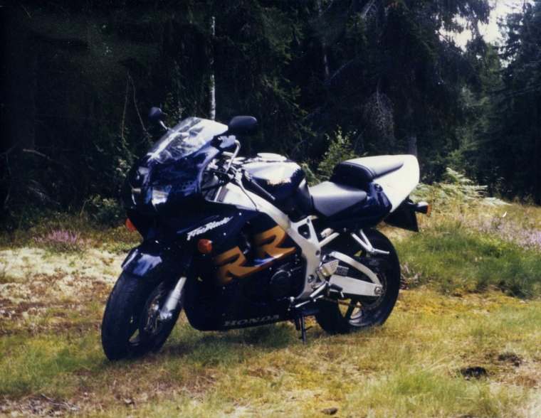 Honda FirebladeSC 33 II Fotogafiert auf der Halbinsel Värmlandsnäs am Vänern bei Säffle